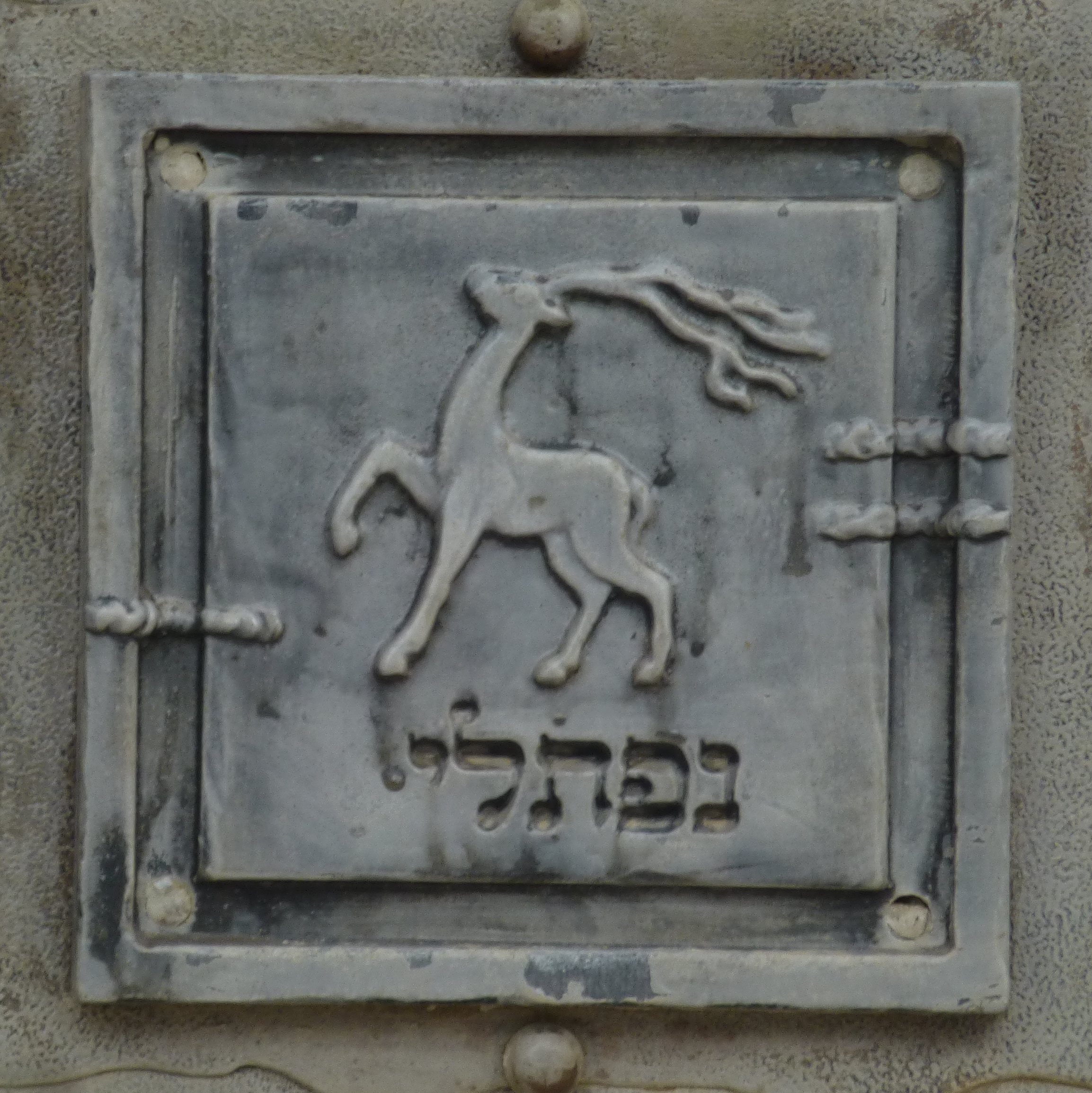 בית הכנסת הגדול "אוהל שרה" - בית הכנסת הראשון של רחובות, נבנה בשנת תרס"ד? ובהמשך שופץ והורחב והיה למוקד הקהילתי והחברתי של המושבה הצעירה.